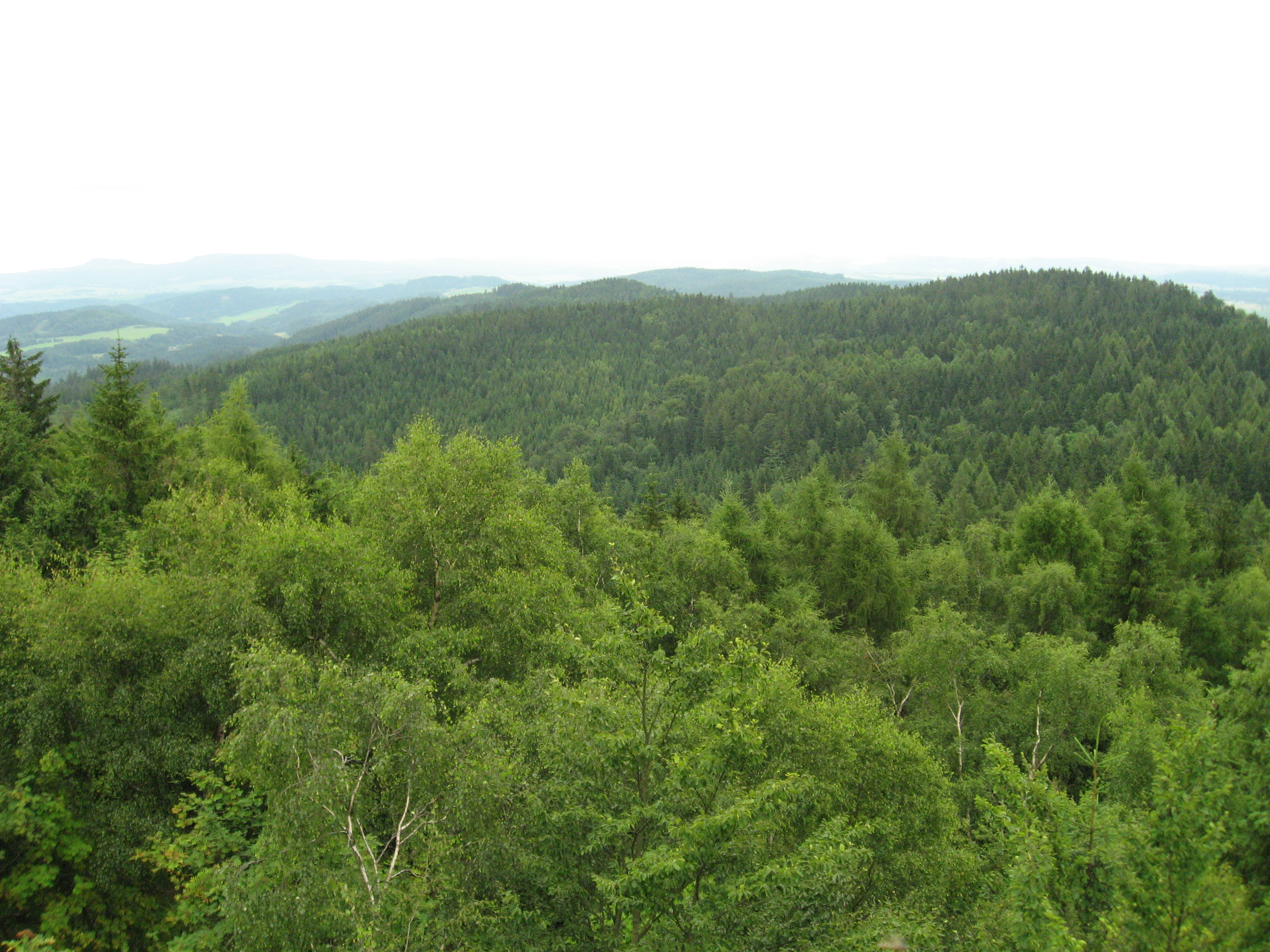 Výhled z rozhledny Žaltman